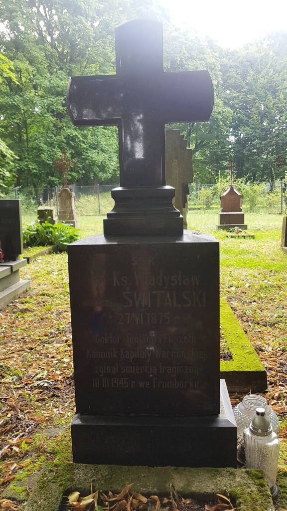 Władysław Świtalski Cmentarz kanoników we Fromborku